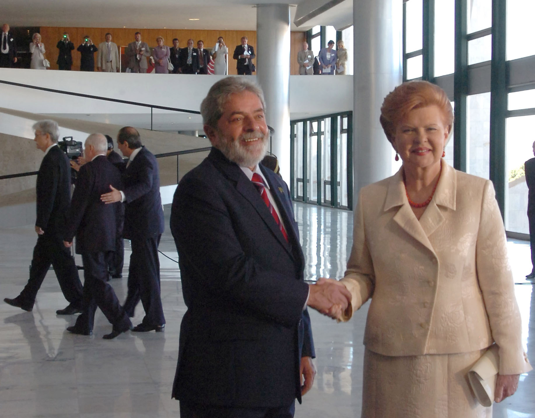 O presidente Luiz Inácio Lula da Silva cumprimenta a presidente da Letônia, Vaira Vīķe-Freiberga, durante cerimônia de boas-vindas no Palácio do Planalto.